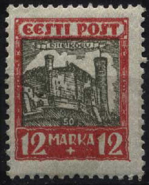 Почтовая марка Эстонии. Замок Тоомпеа с башней Длинный Герман, 1927